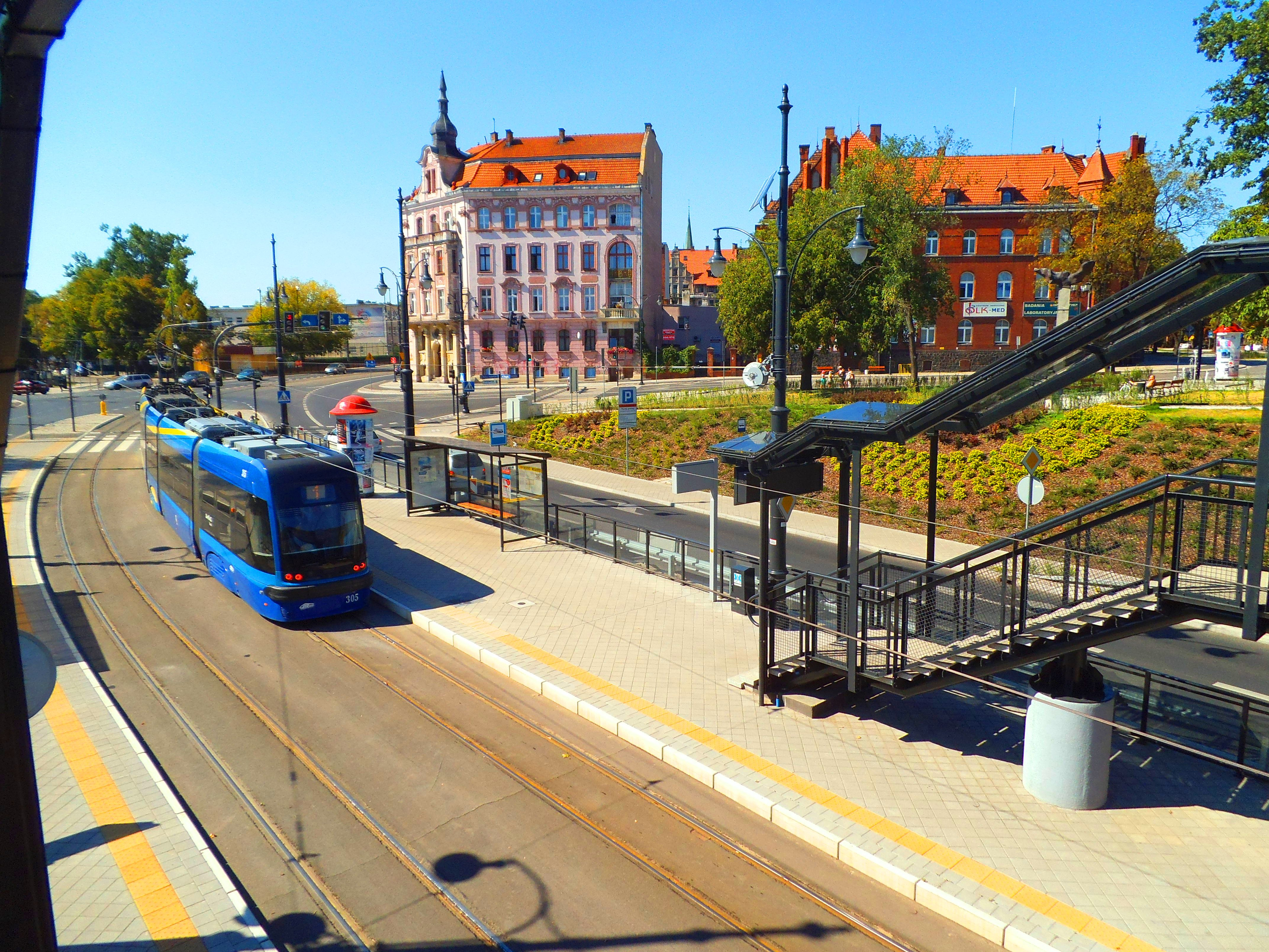 węzeł przesiadkowy na Placu 18. Stycznia, Toruń